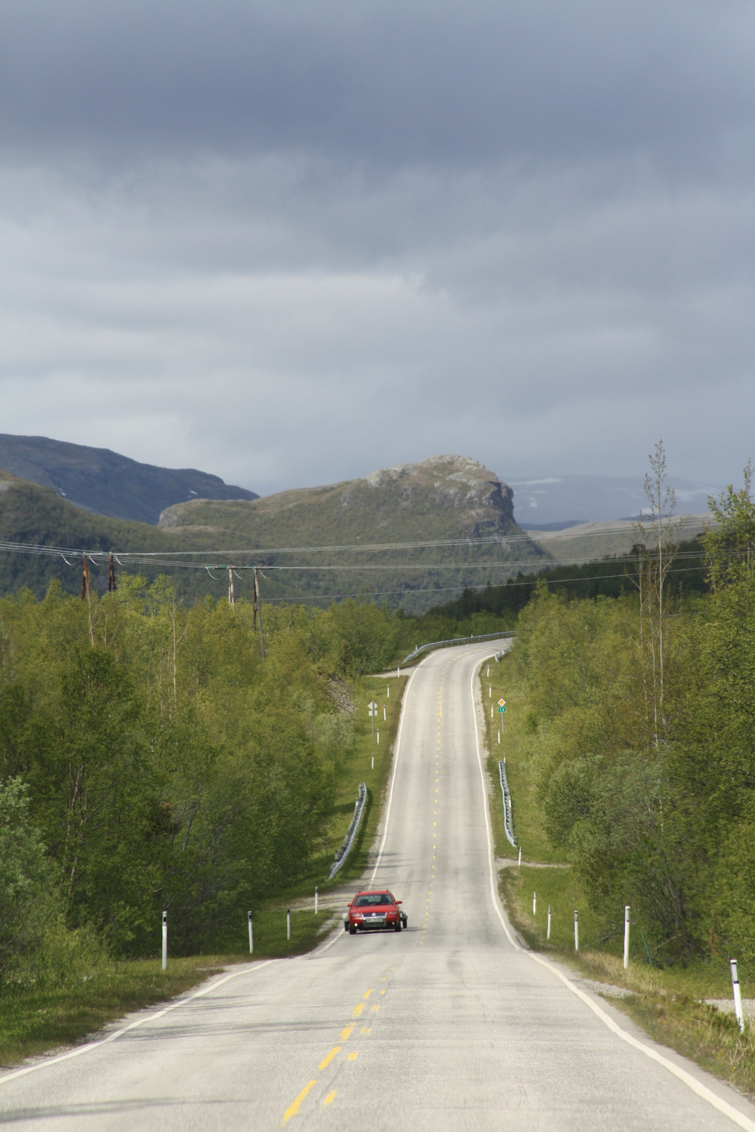 road's view